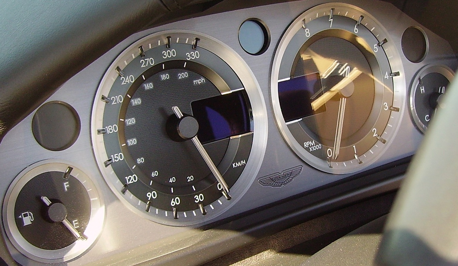 Aston Martin DB9 Volante - tableau de bord.